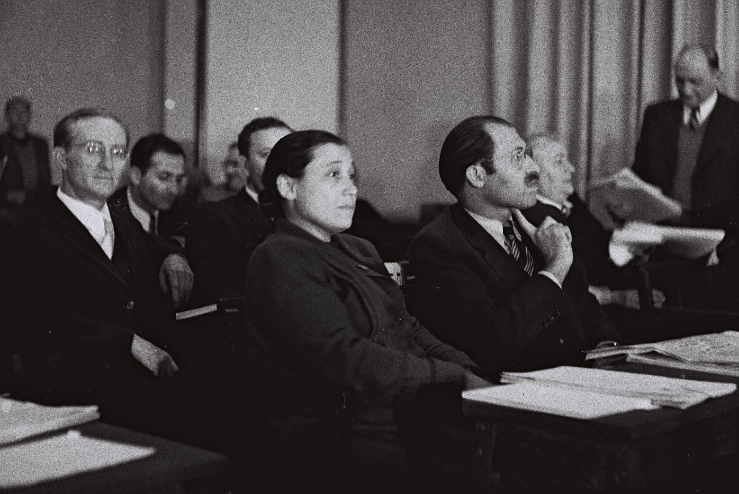 חברי סיעת חירות: (משמאל לימין) אורי צבי גרינברג, אסתר רזיאל נאור ומנחם בגין, בעת הישיבה הראשונה של הכנסת בירושלים